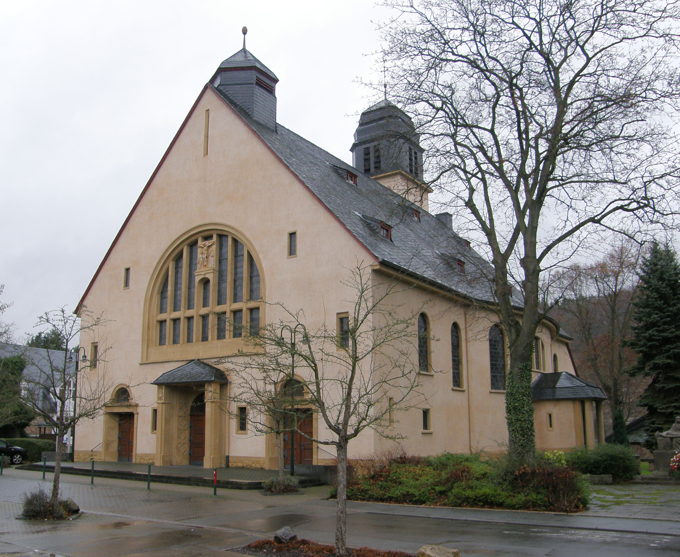 WAL KIE.